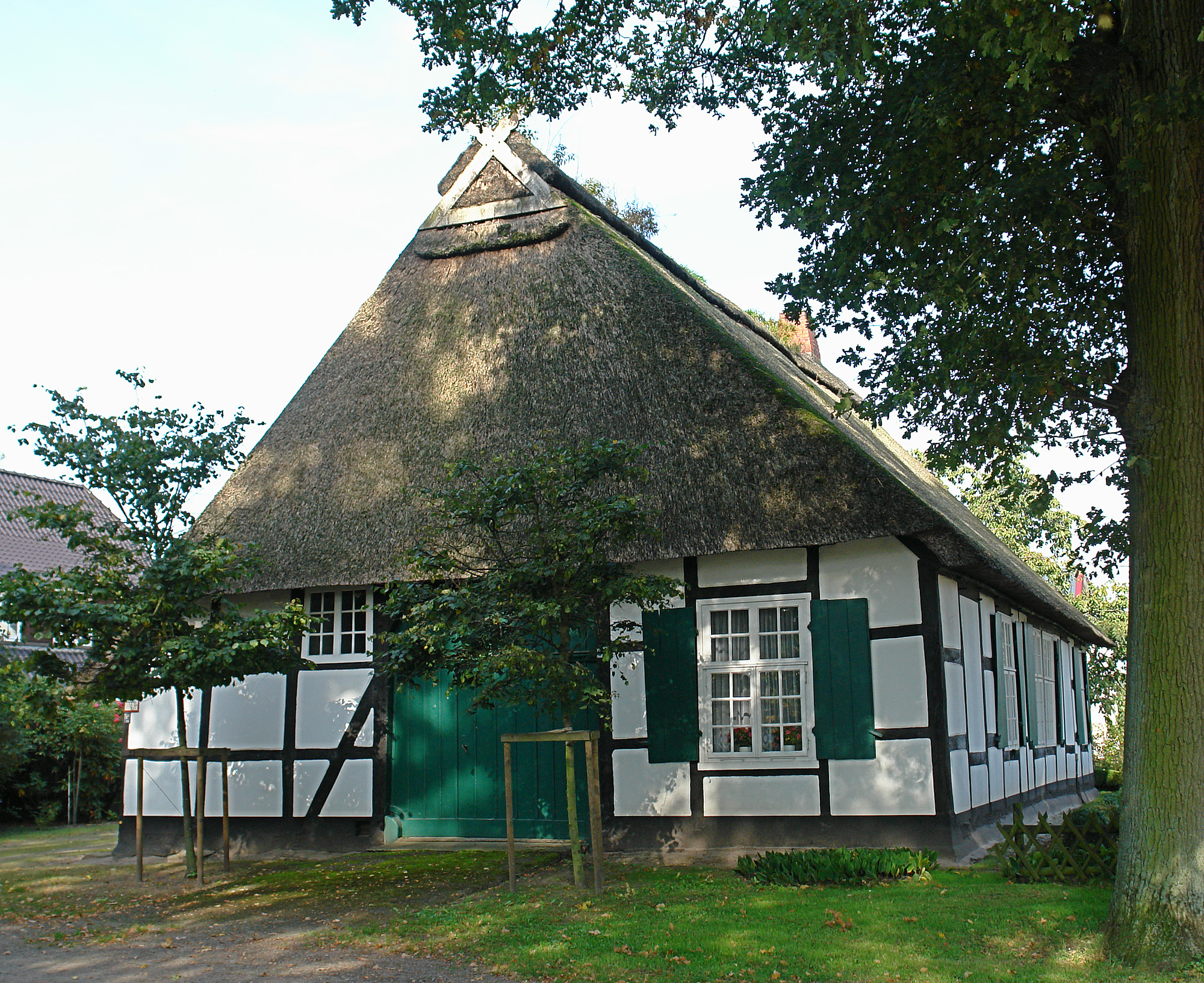 Haus Schumacher in Bremen, Oberneulander Landstraße 93.Das abgebildete Objekt ist ein geschütztes Kulturdenkmal in der Freien Hansestadt Bremen, mit der Nr. 0949 beim Landesamt für Denkmalpflege registriert.